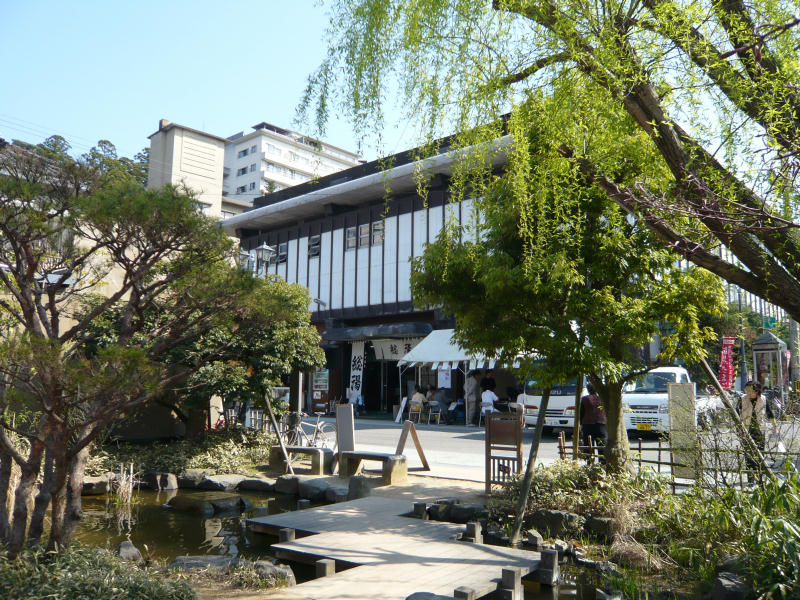 山代温泉総湯（2009年）